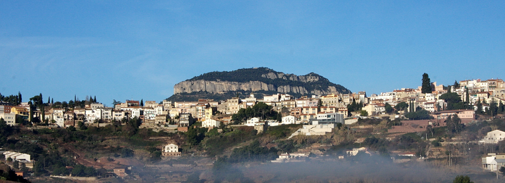 Sant Feliu de Codines (Vallès Oriental, Catalunya) vist des de la carretera de Bigues i Riells, amb la Mola (dins del terme de Granera) al darrere.